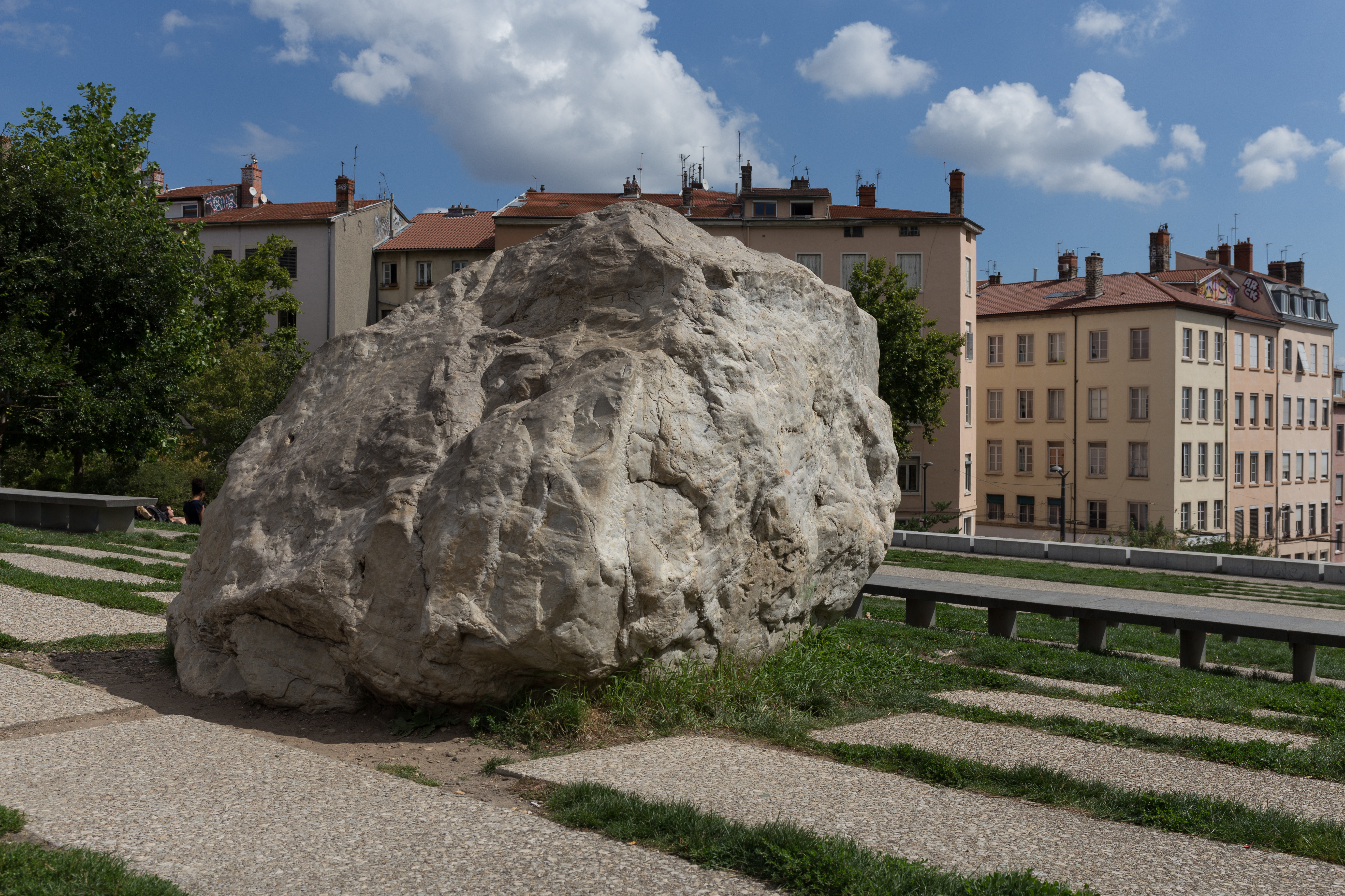 Le Gros Caillou, bloc erratique situé actuellement dans le 1er arrondissement de Lyon.